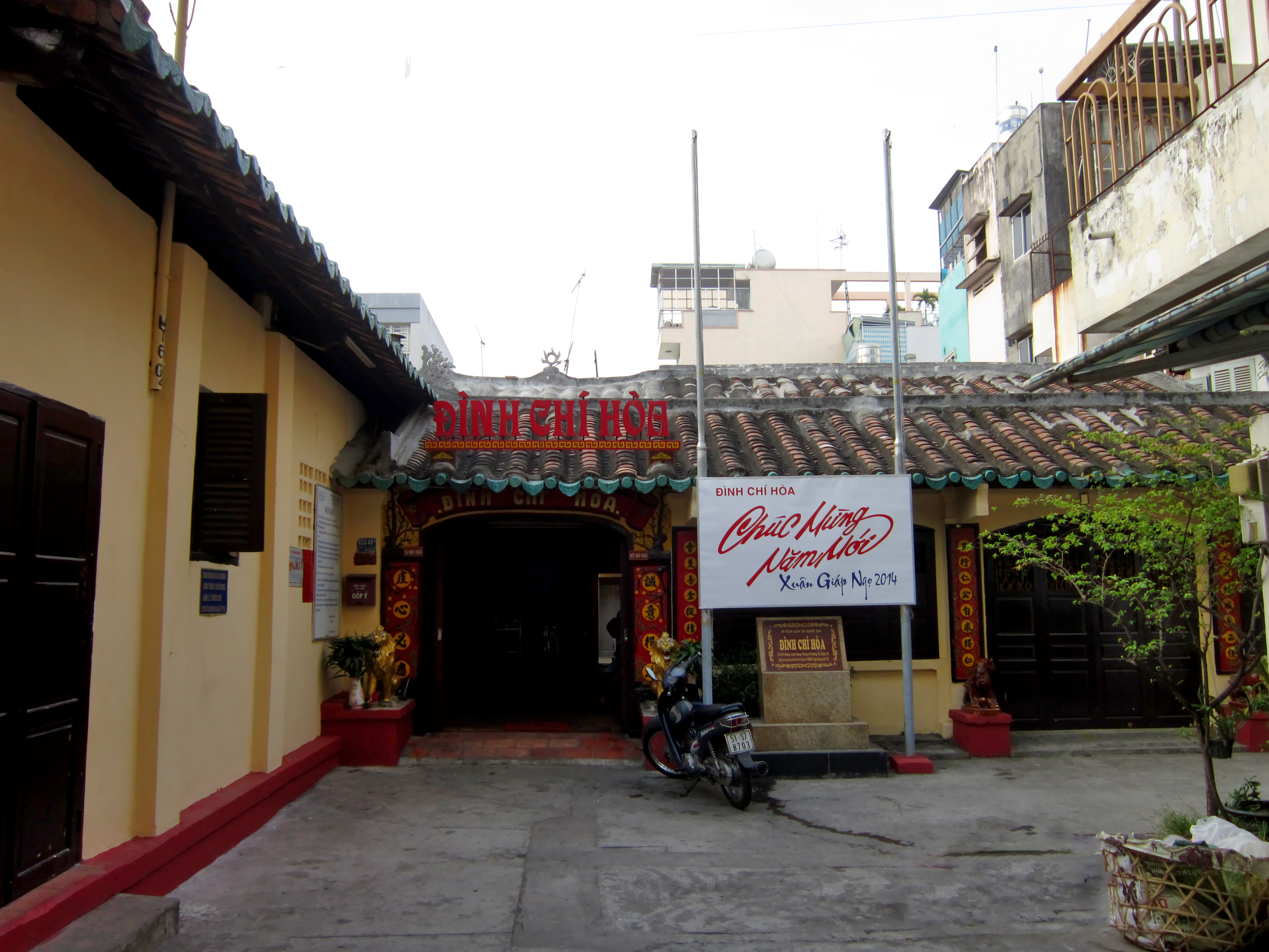 Đình Chí Hòa là một ngôi đình cổ, hiện toạ lạc trong con hẽm số 475 đường Cách Mạng Tháng Tám, thuộc phường 13, quận 10, Thành phố Hồ Chí Minh, Việt Nam.